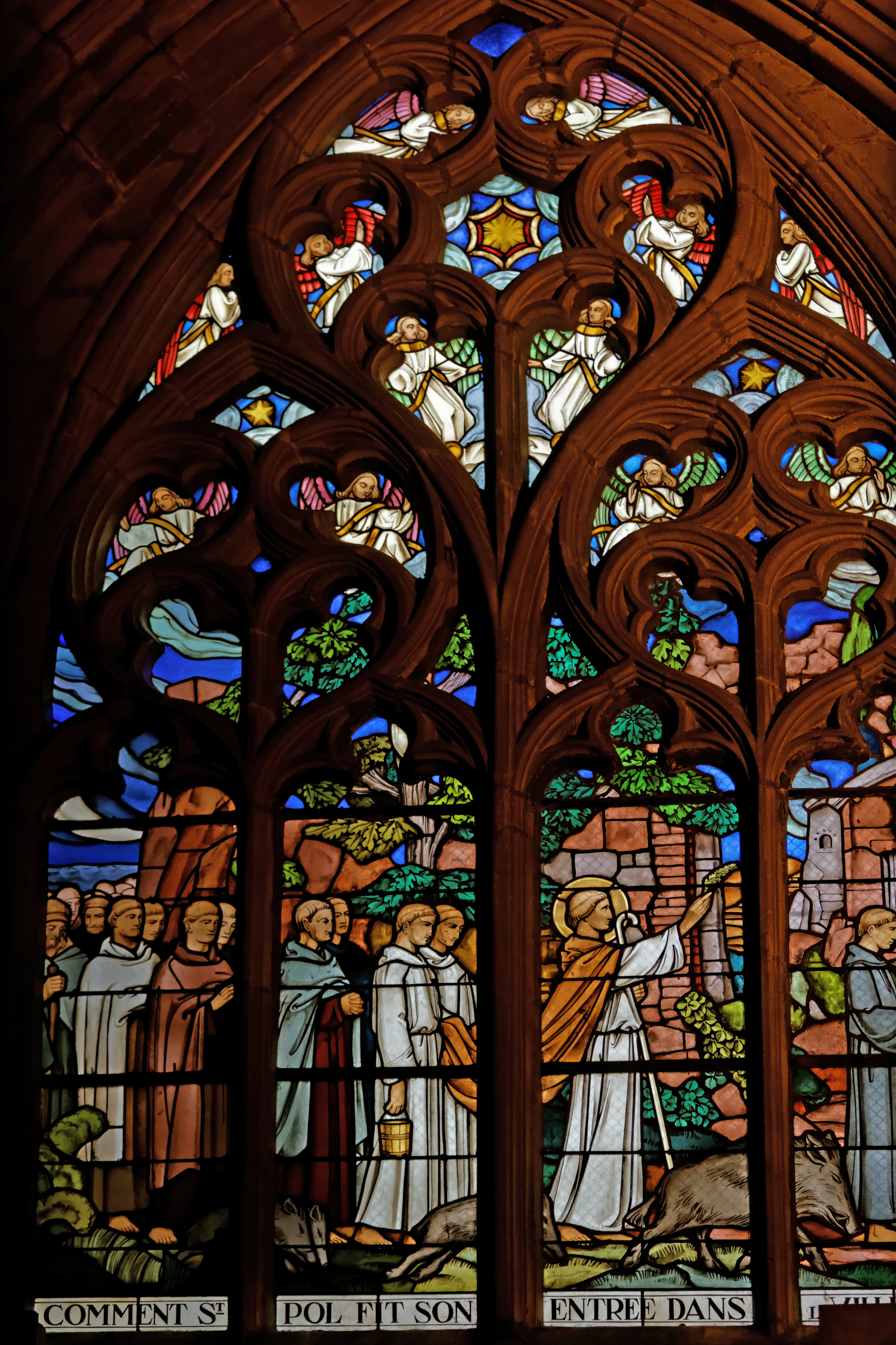 Vitrail représentant "Comment saint Paul fit son entrée dans la ville morte" (atelier Labouret - 1935) dans la cathédrale Saint-Paul-Aurélien de Saint-Pol-de-Léon.